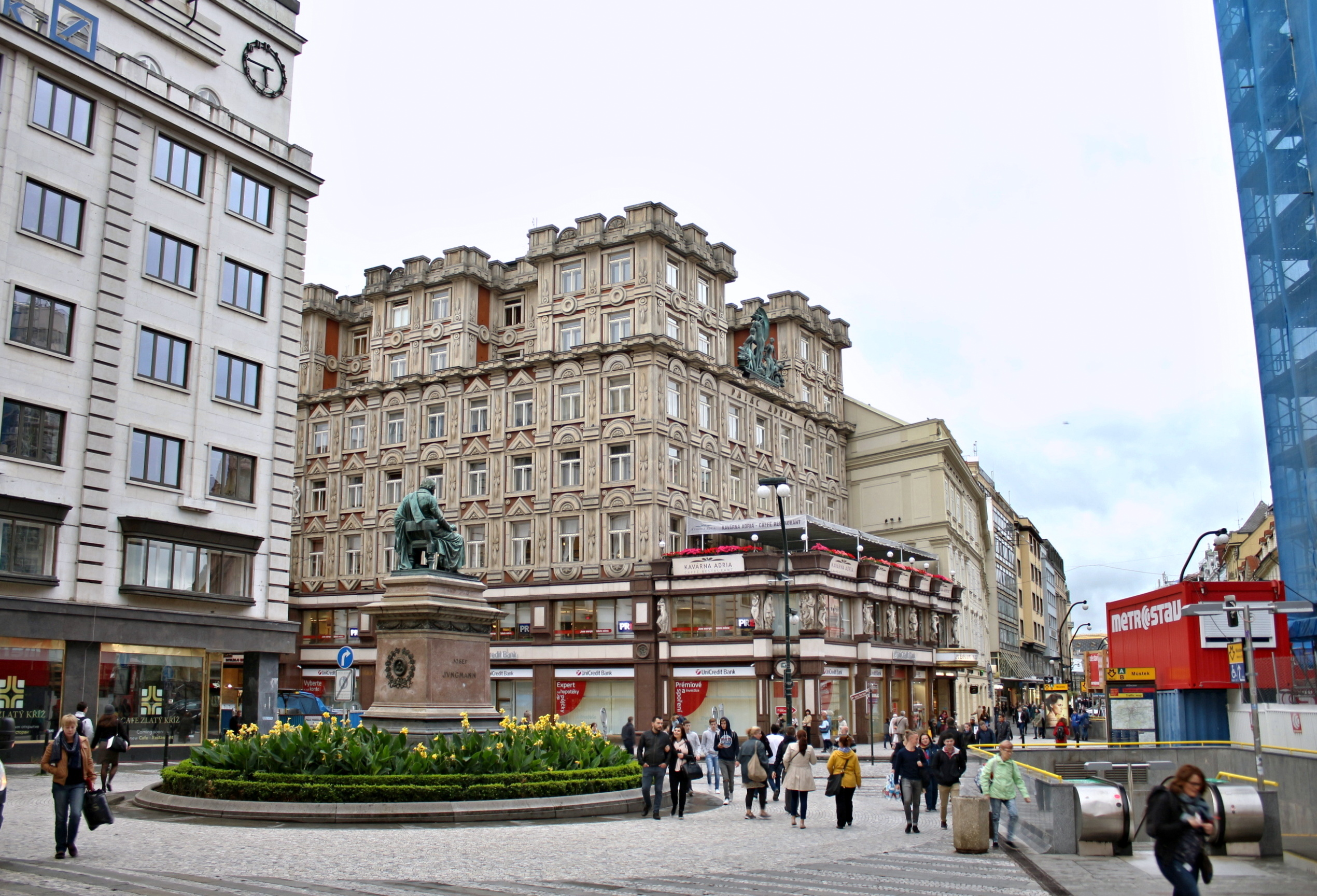 Palác Adria v Praze